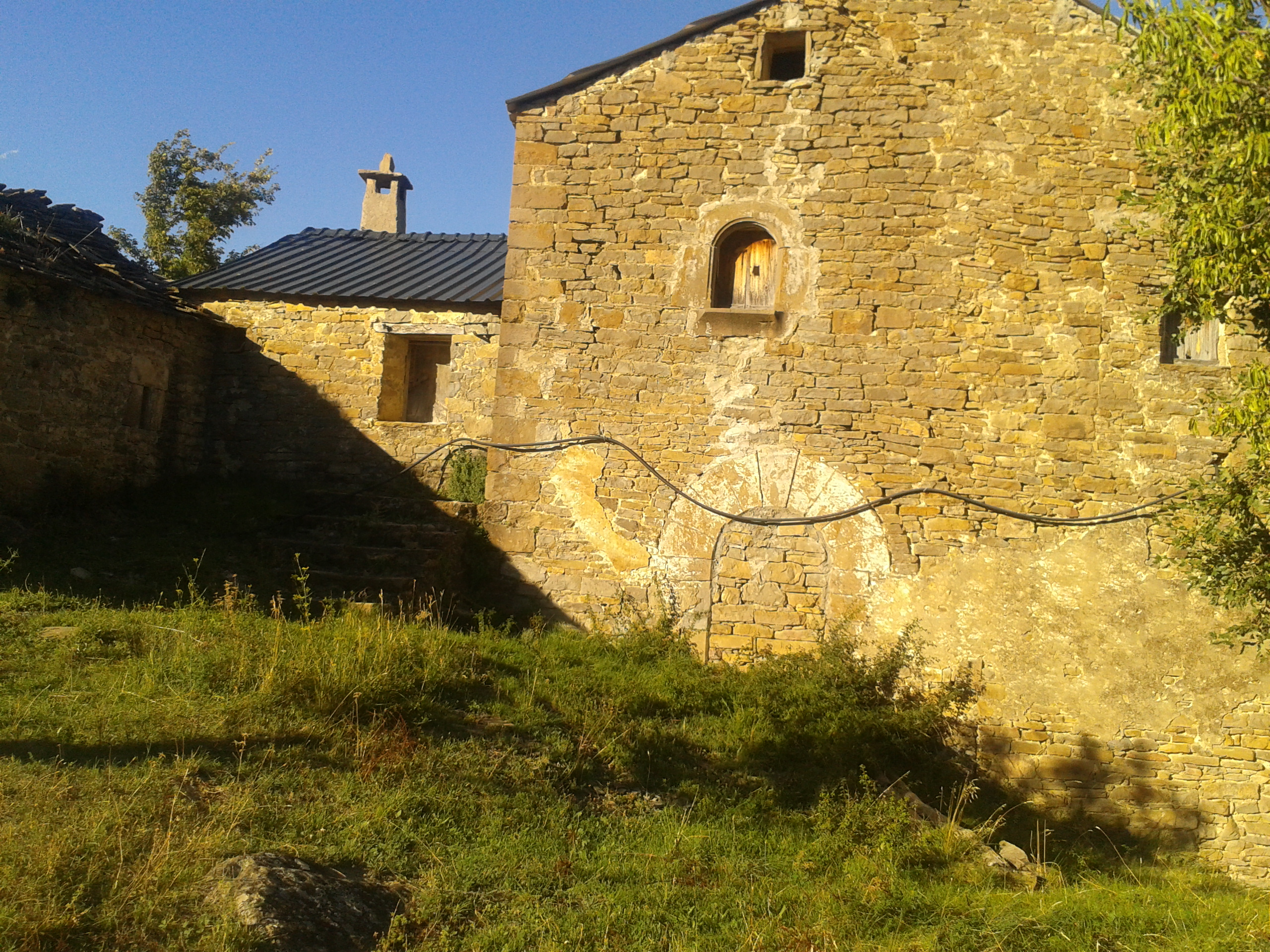 A la izda la capilla y la parte oeste de casa Broto